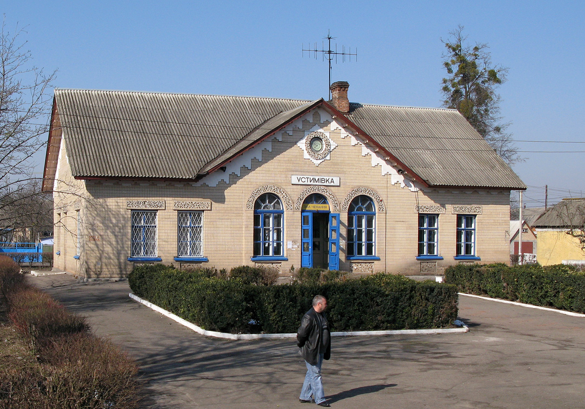 Вокзал ст. Устимівка